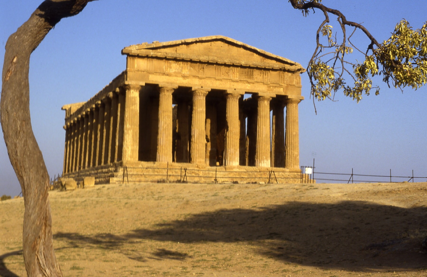 Photo par moi-même, utilisation possiblesous licence CC-BY-SA. Dingy